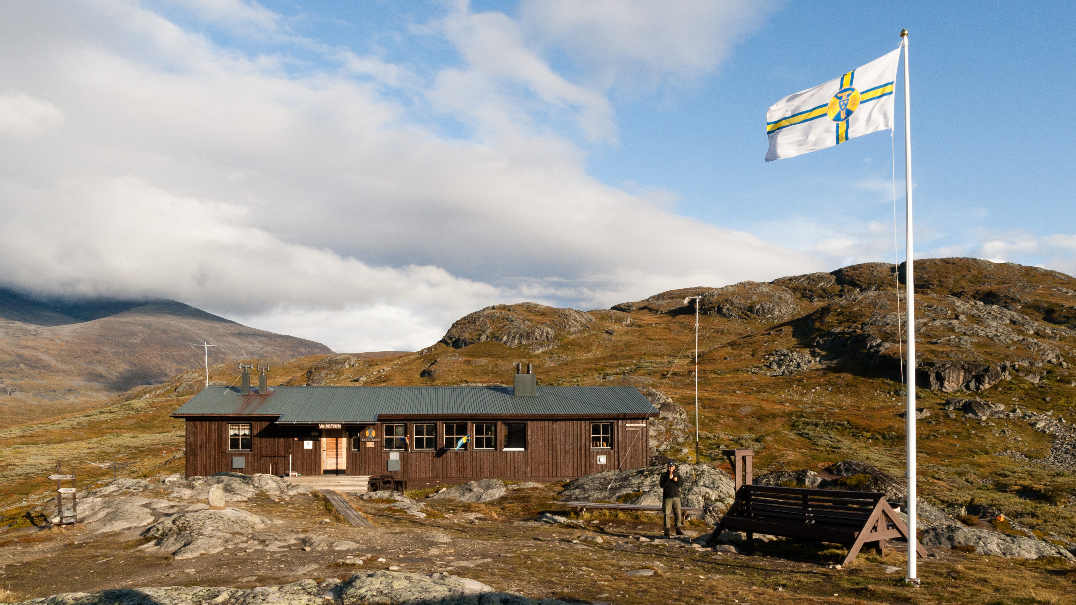 Alesjaurestugorna